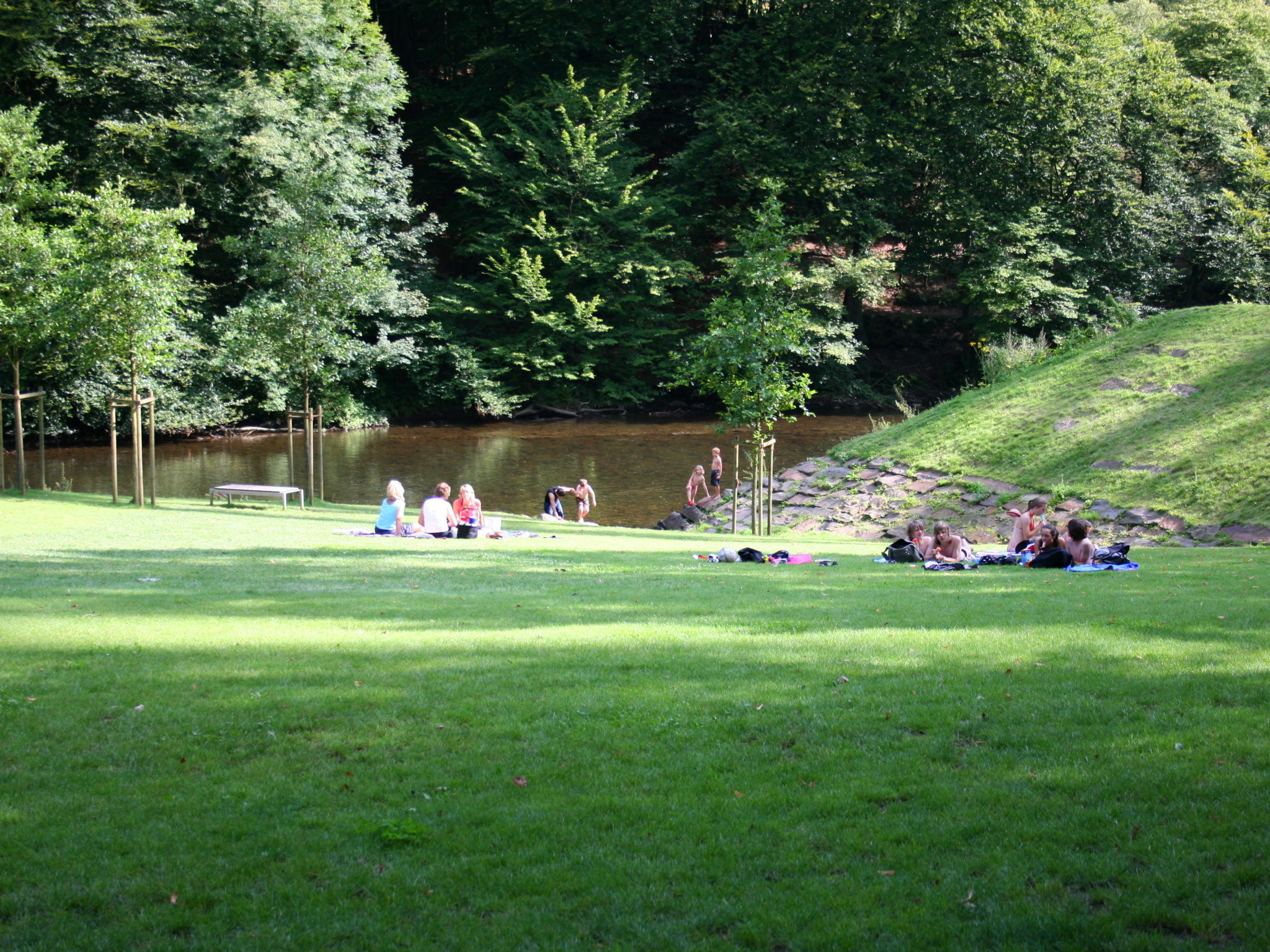 Brückenpark in Müngsten (Solingen/Remscheid), unterhalb der Müngstener Brücke